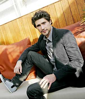 Foto originale: Modificata by Math